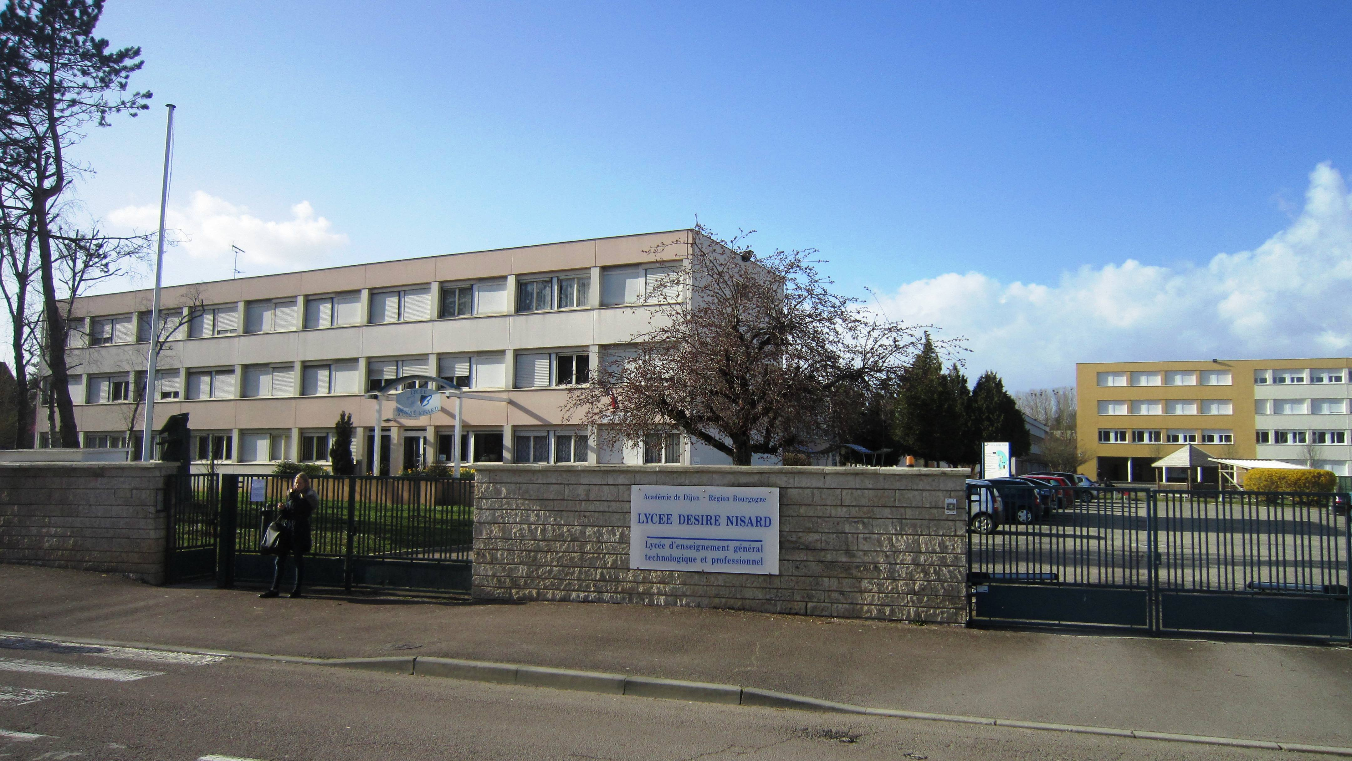 Lycée de Châtillon-sur-Seine (Côte-d'Or)